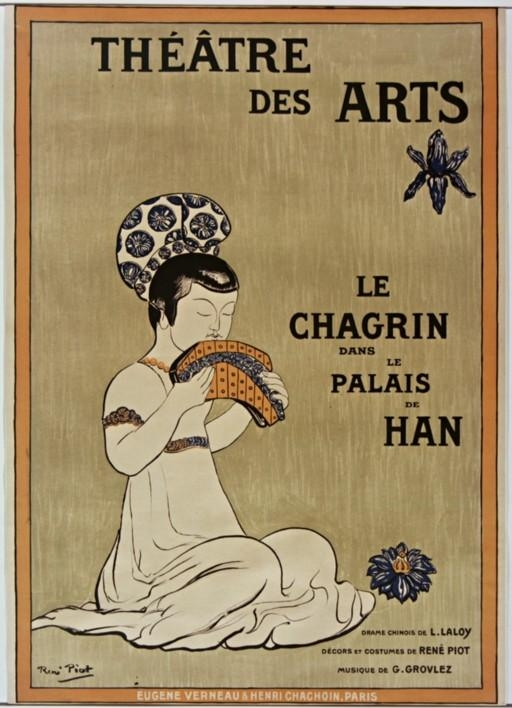 Théatre des Arts. le Chagrin dans le Palais de Han, drame chinois de L. Laloy, décors et costumes de René Piot, musique de G. Grovle : [affiche]